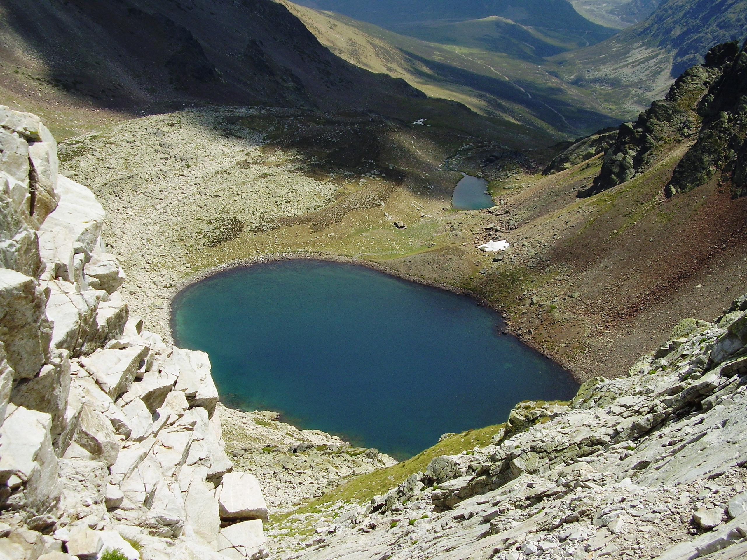 Laguna De Fuentes Carrionas, Palencia, España